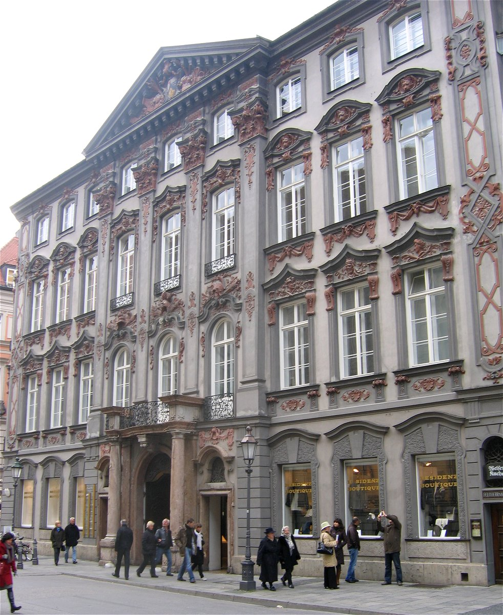 Residenzstraße 27; Ehem. Preysing-Palais, jetzt Geschäftshaus, Regence-Stil, mit reich stuckierten Fassaden an drei Seiten, prächtigem Treppenhaus, 1723-28 von Joseph Effner; nach Kriegsschäden Wiederaufbau 1958-60 durch Erwin Schleich, dabei Rückseite an der Theatinerstraße rekonstruiert und Inneres erneuert; in München, Ostseite (Theatinerstraße)